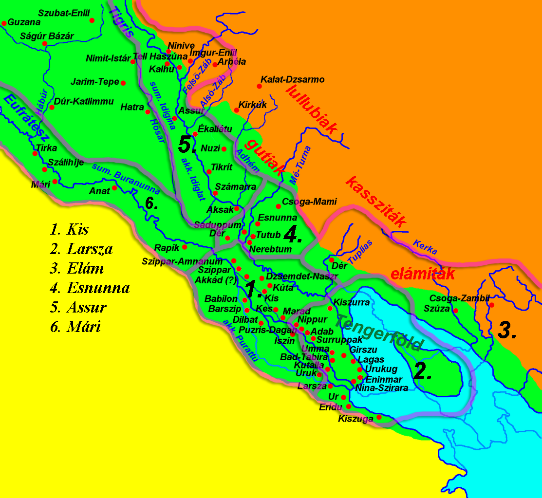 Mezopotámia térképe i. e. 1890 körül